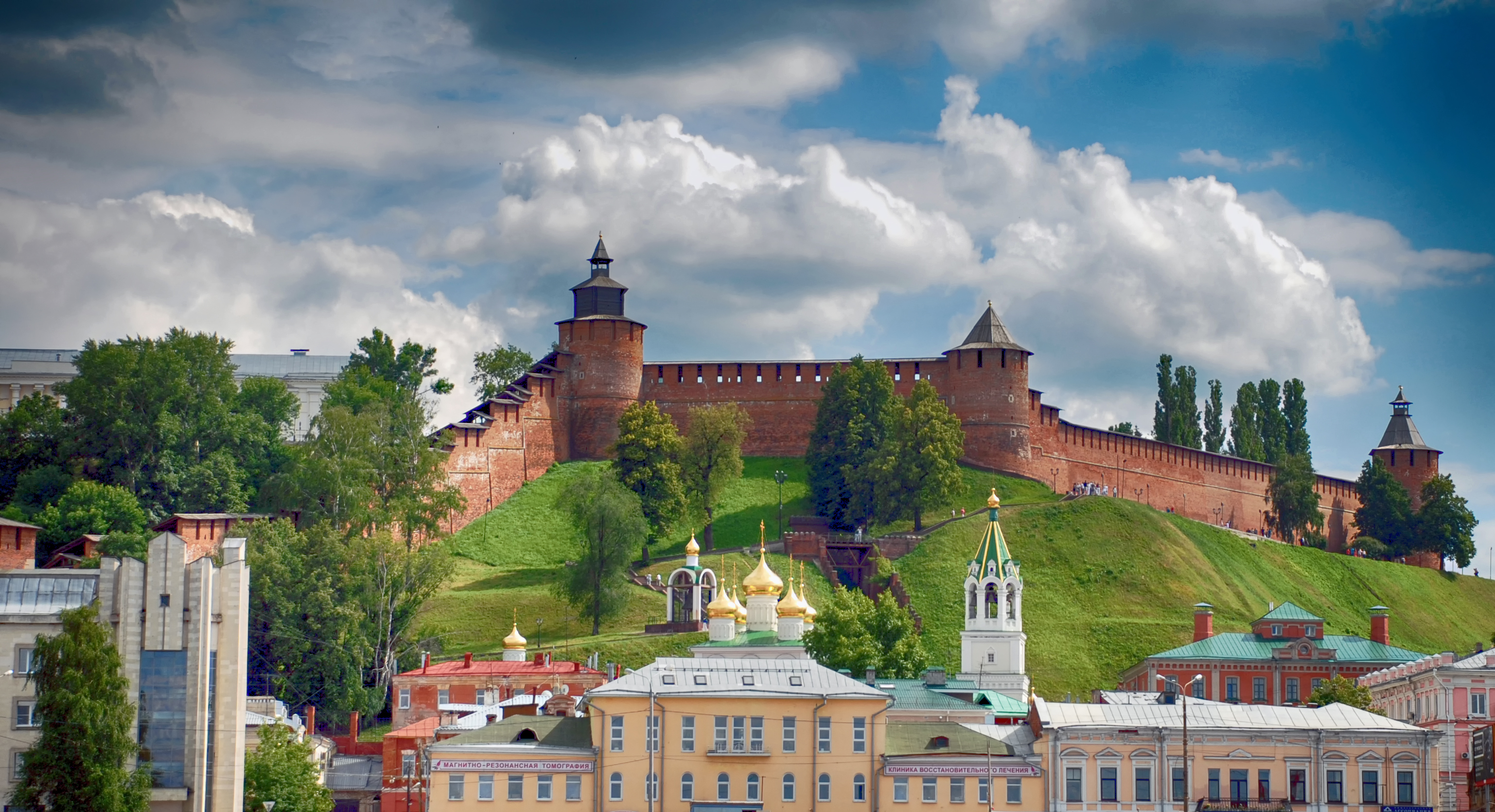 Вид на Нижегородский кремль с Волги